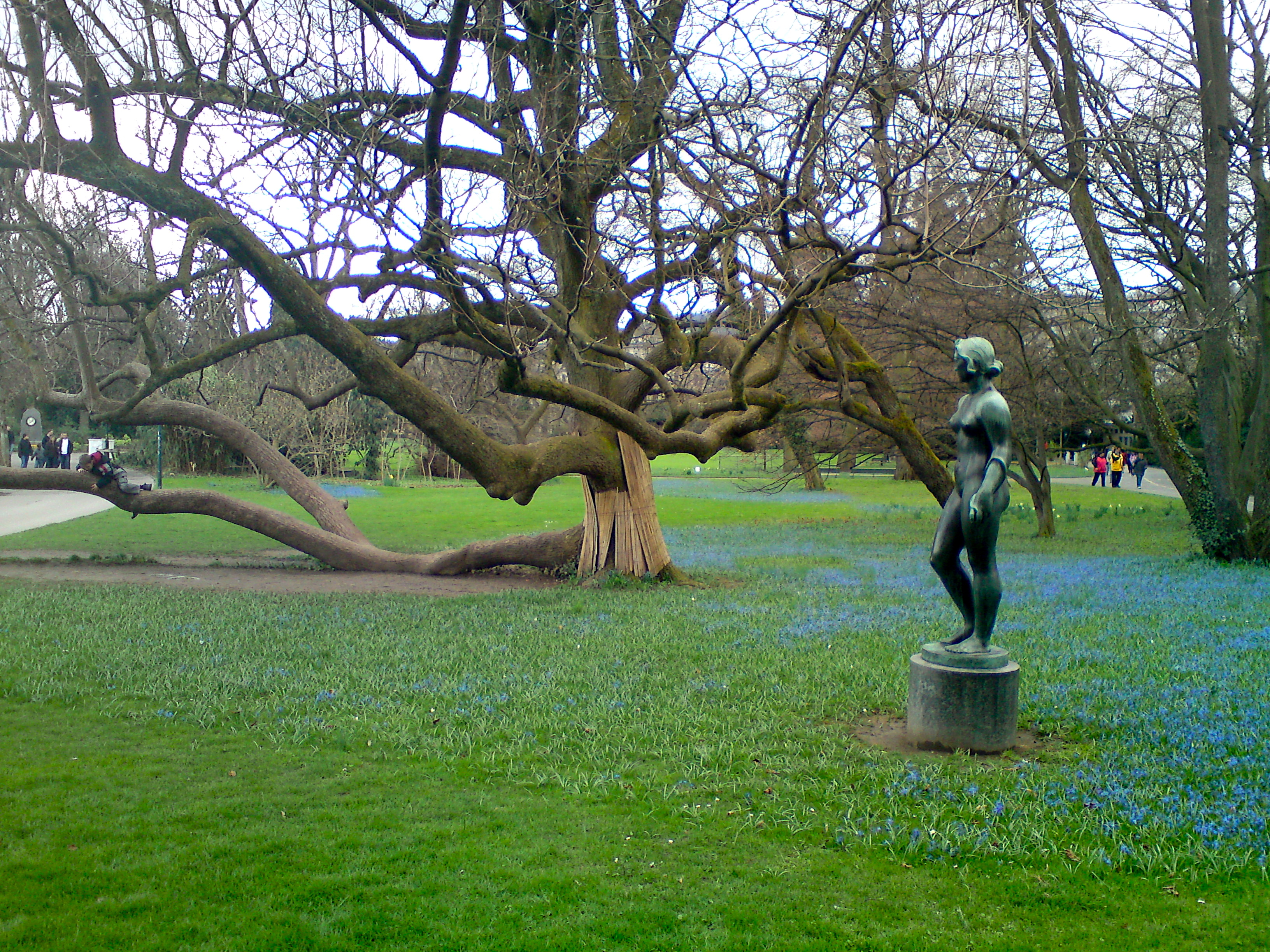 Arboretum Zuerich